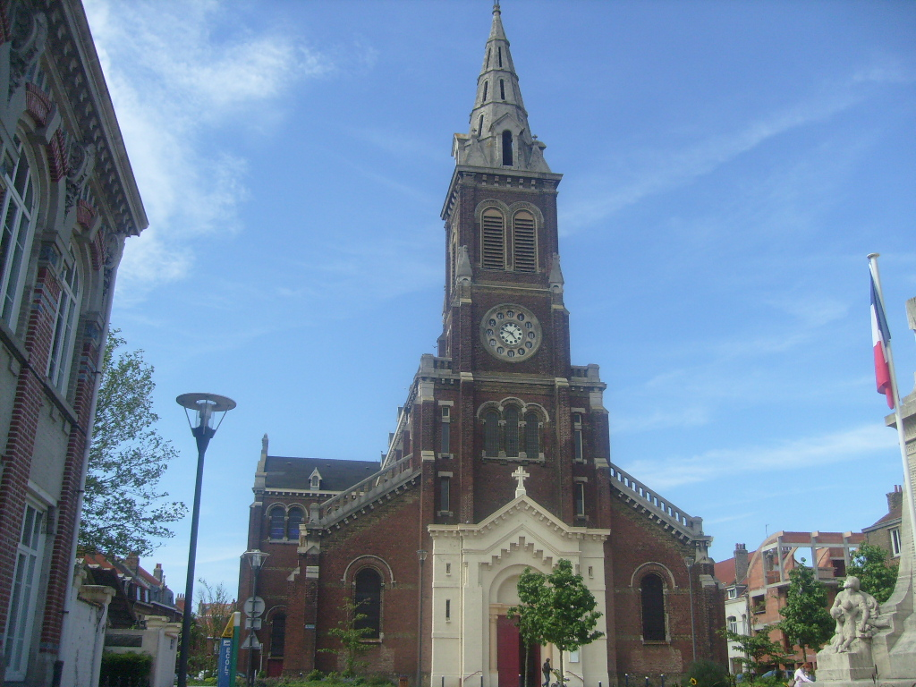 Église de Rosendaël (Dunkerque)